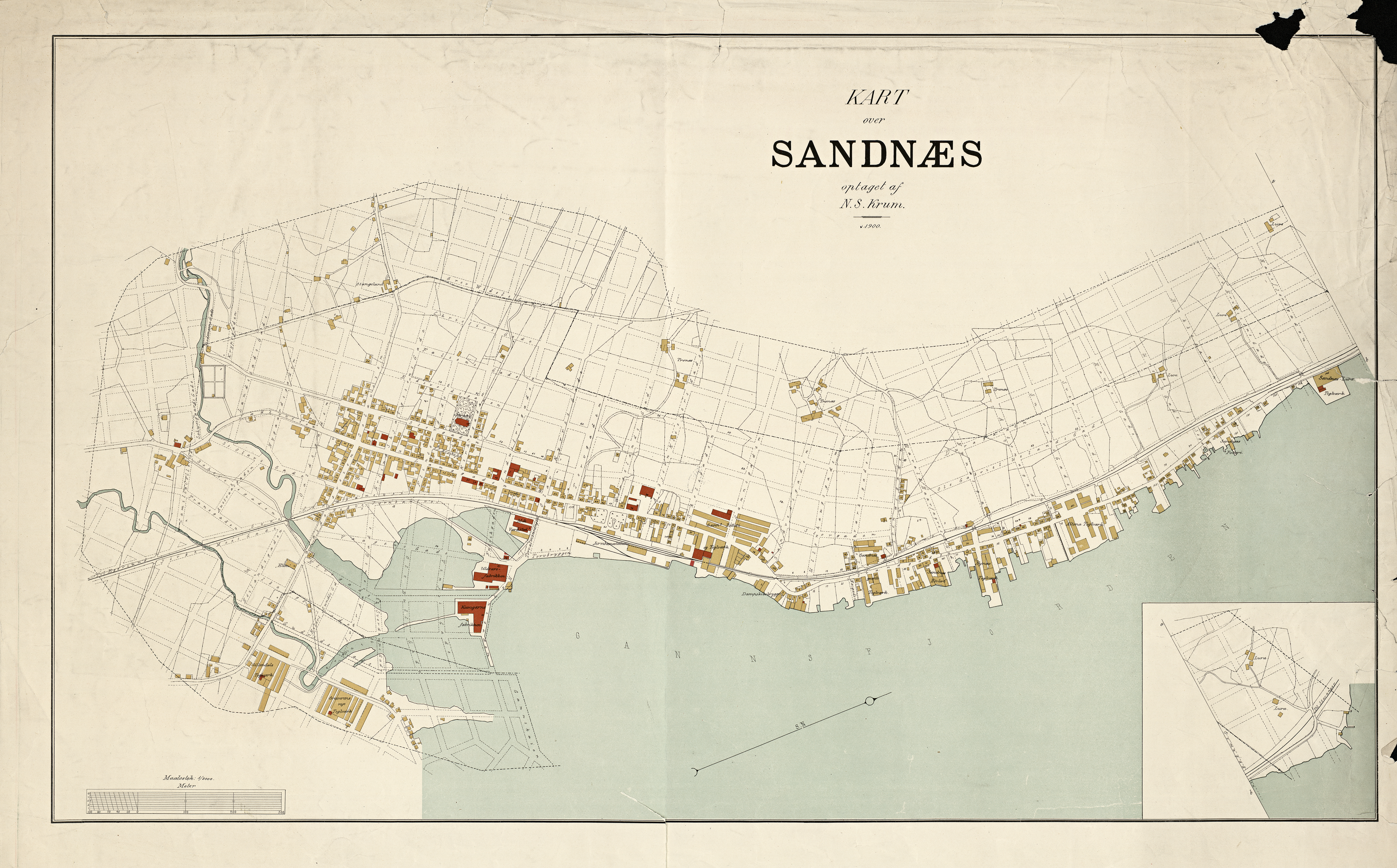 NS Krums kart over SAndnes fra 1900.